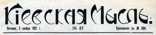 Киевская мысль (1912)